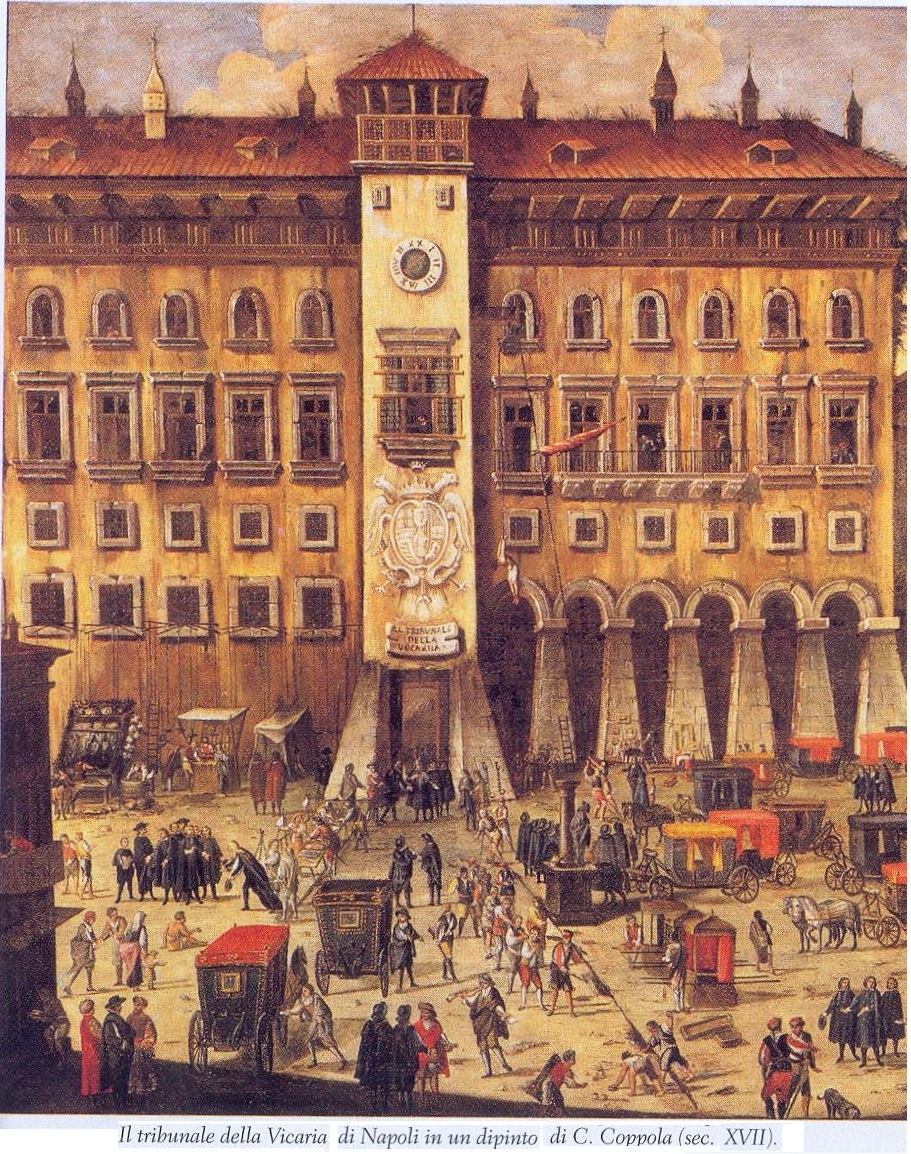 Il Tribunale della Vicaria